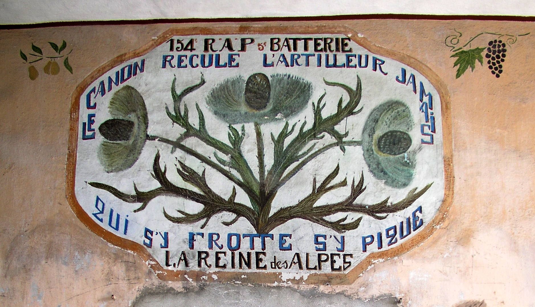 Fresque du fort de Tournoux attestant de présence du 154e RAP